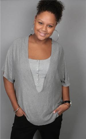 Talisia Misiedjan (Amsterdam, 11 mei 1990) is een Nederlands/Surinaams actrice.